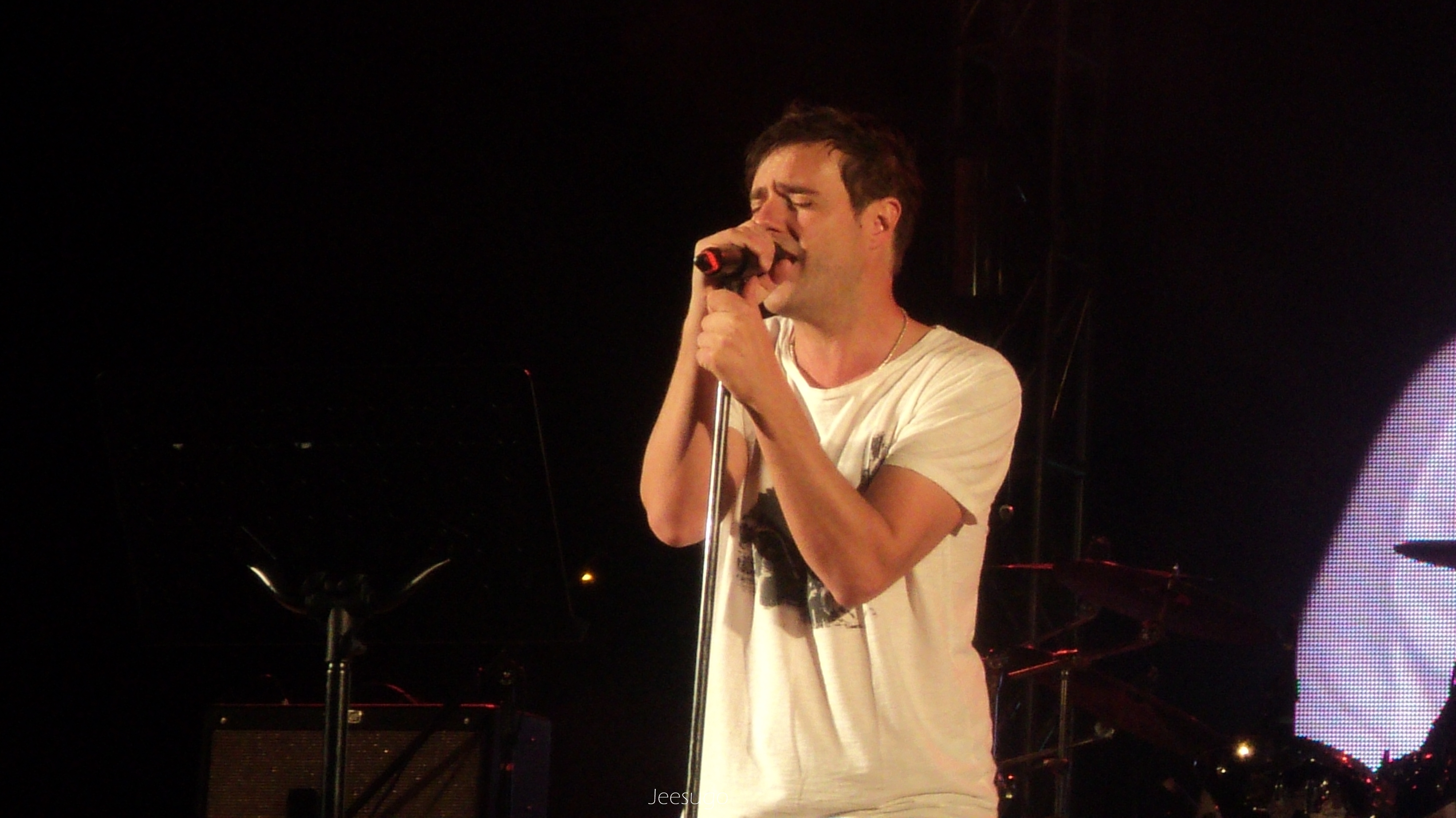 Paolo Meneguzzi cantando como invitado internacional a la versión 2014 del Festival de la Voz de la ciudad de Constitución,Chile.